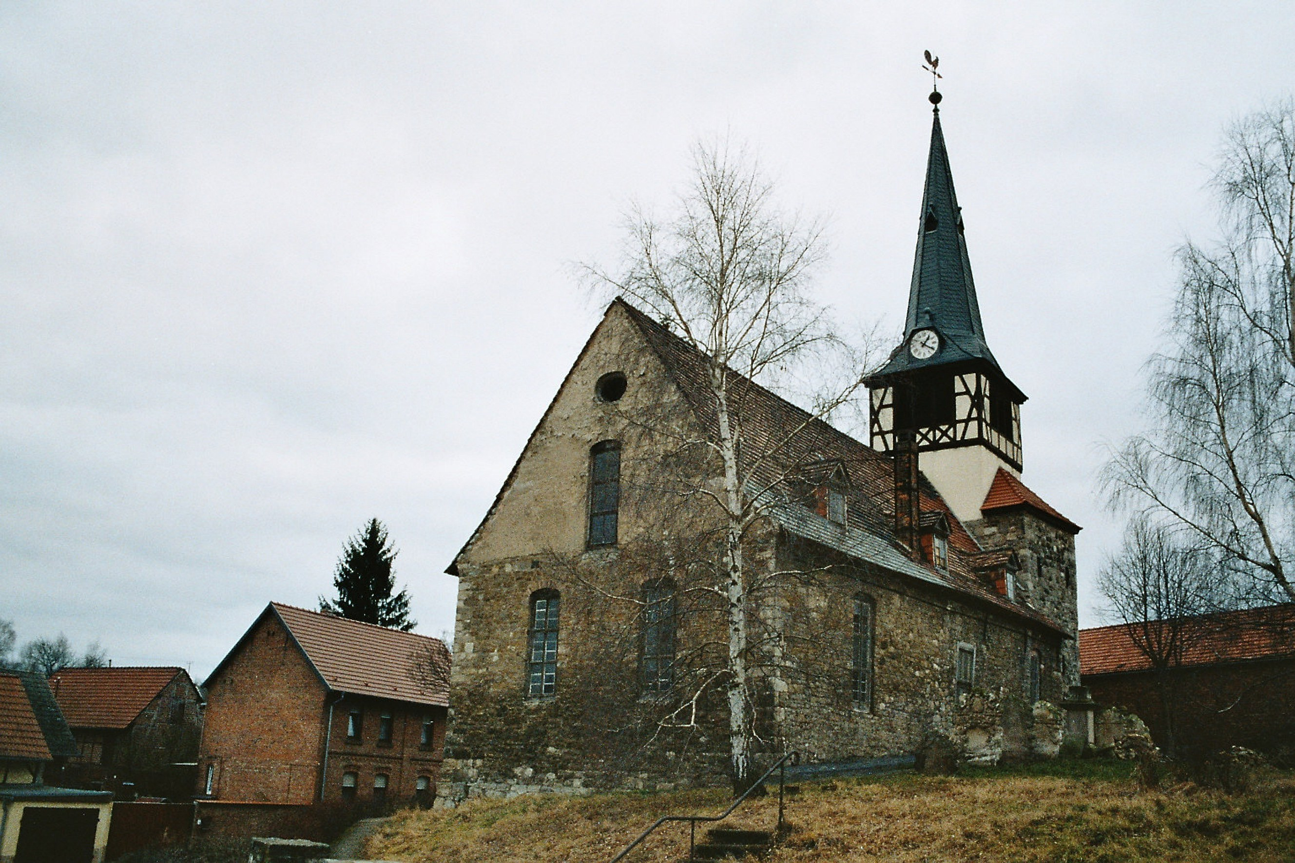 Arnstein, Ortsteil Ulzigerode, Hauptstraße 11; Ulzigeröder Dorfkirche This is a photograph of an architectural monument. 65139